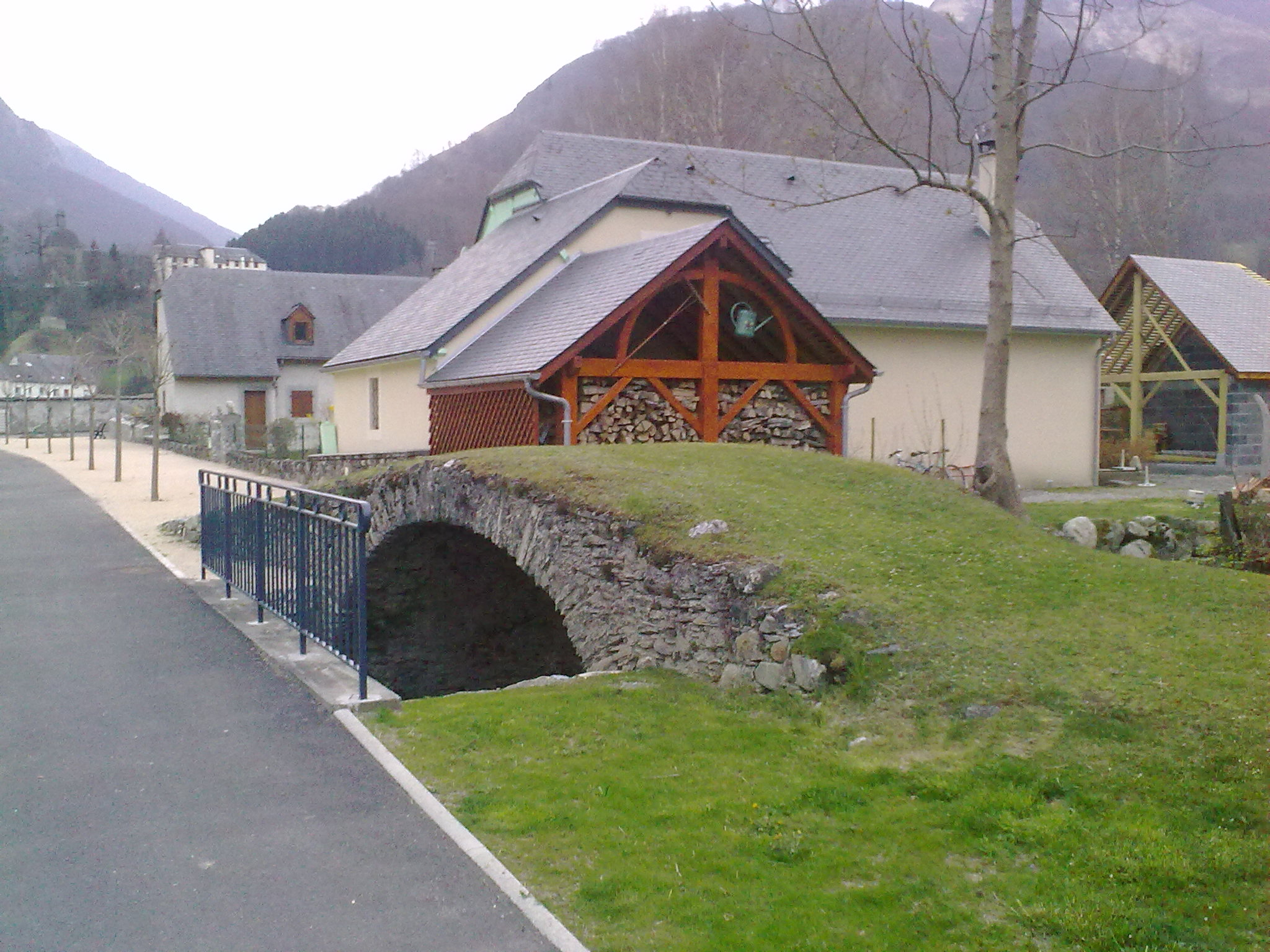 Arrens France